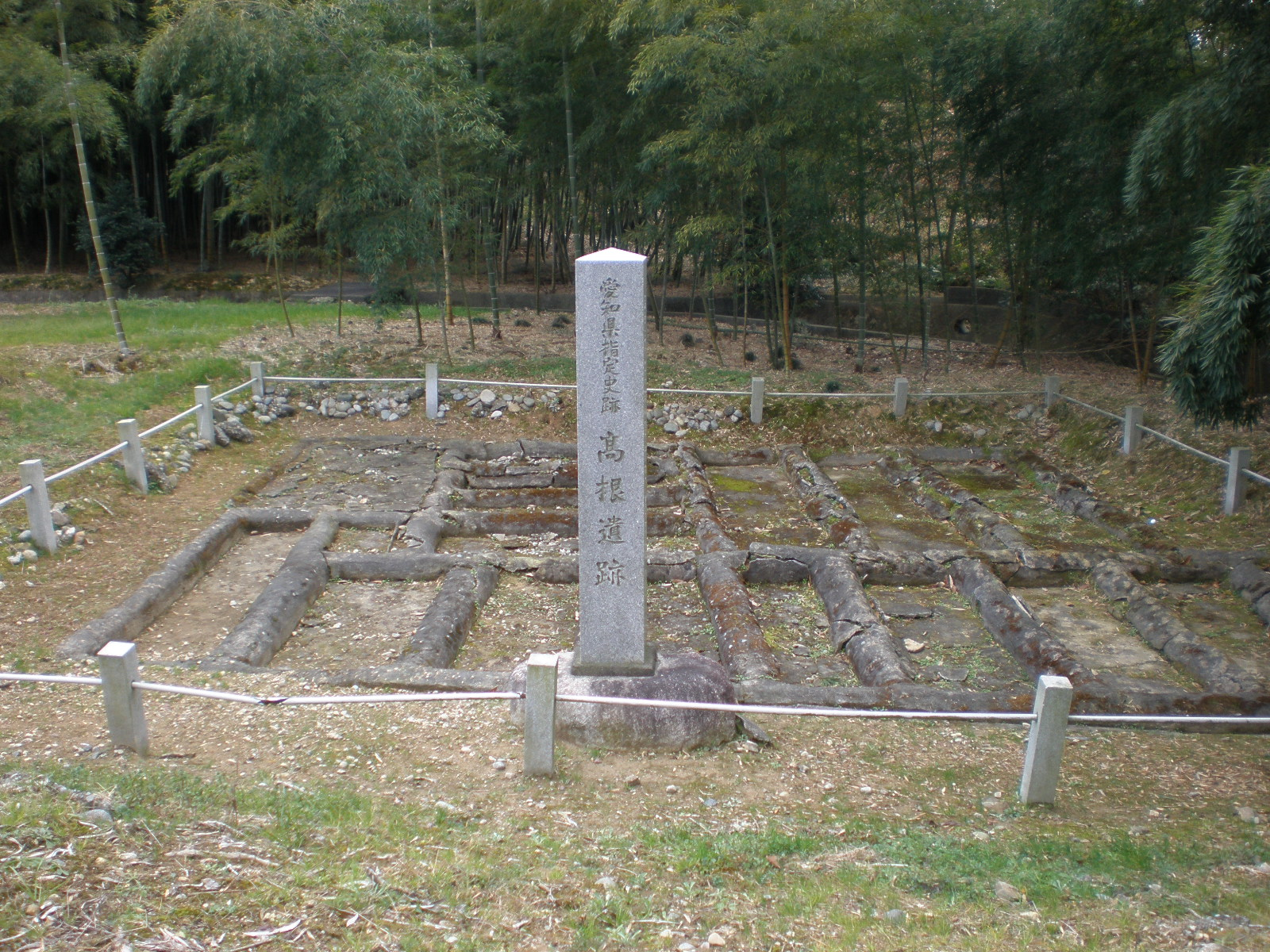 愛知県小牧市にある高根遺跡